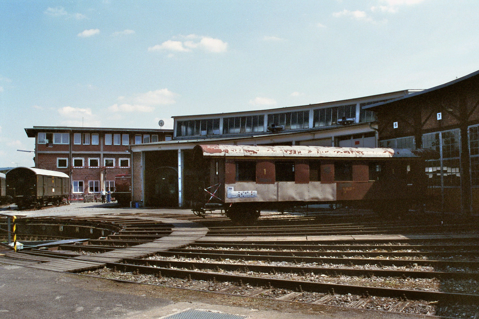 Gelände des SEH: Links befindet sich das Gebäude der ehemaligen Lokleitung, dahinter ist die Wagenhalle, in der Mitte ist der Neubaubereich des Ringlokschuppens und rechts ist der Altbaubereich des Schuppens, der unter Denkmalschutz steht.